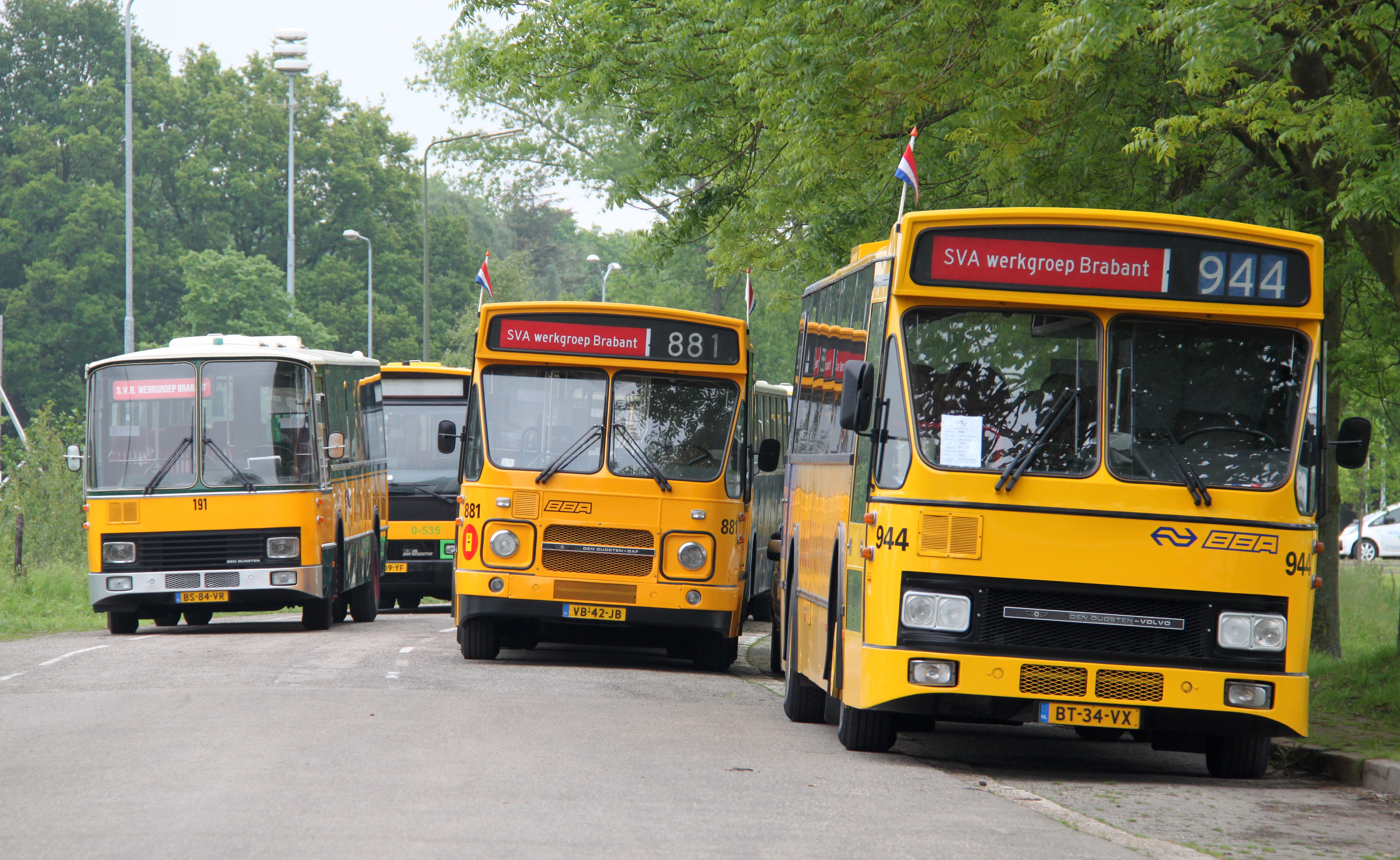 Drie verschillende voorkanten en varianten van de bekende gele standaardstreekbus. Links de EMA 191 uit 1986 met kenmerkende door KLM ontworpen kop. In het midden de gelede variant en wel in de vorm van de BBA 881. Rechts de Volvo-Den Oudsten 944 met speciaal interieur voor de wat langere afstand. De sneltreinbus werd in het leven geroepen als alternatief voor de ontbrkende spoorlijn Utrecht-Breda. Alle bussen maken deel uit van de Werkgroep Brabant van de Stichting Veteraan Autobussen.